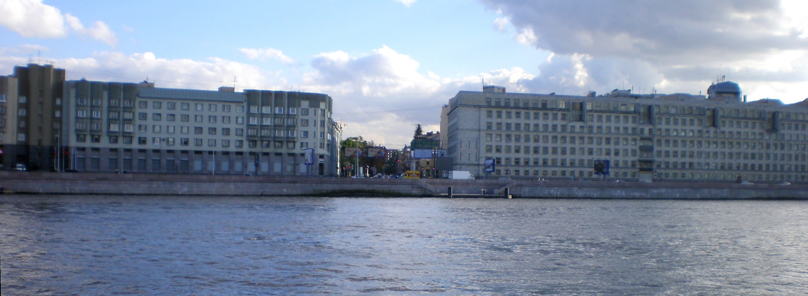 Перекрёсток набережной Робеспьера и Потёмкинской улицы, спуск к Неве.